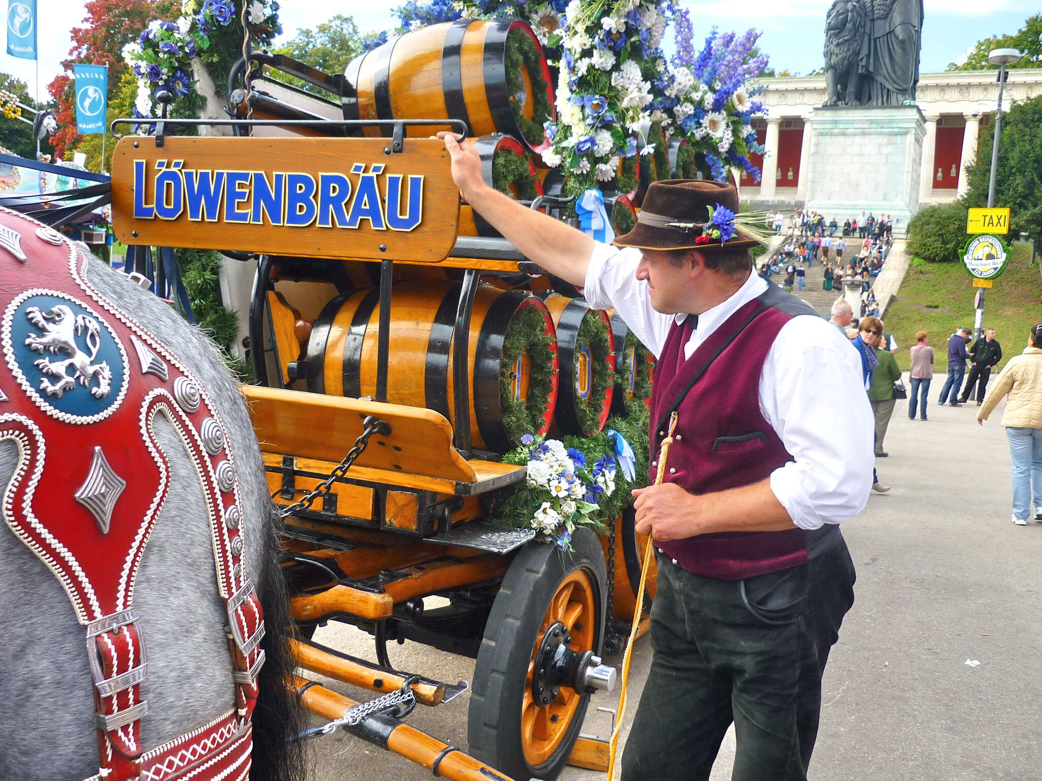 München, Oktoberfest-Kutscher